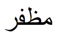 Музаффар